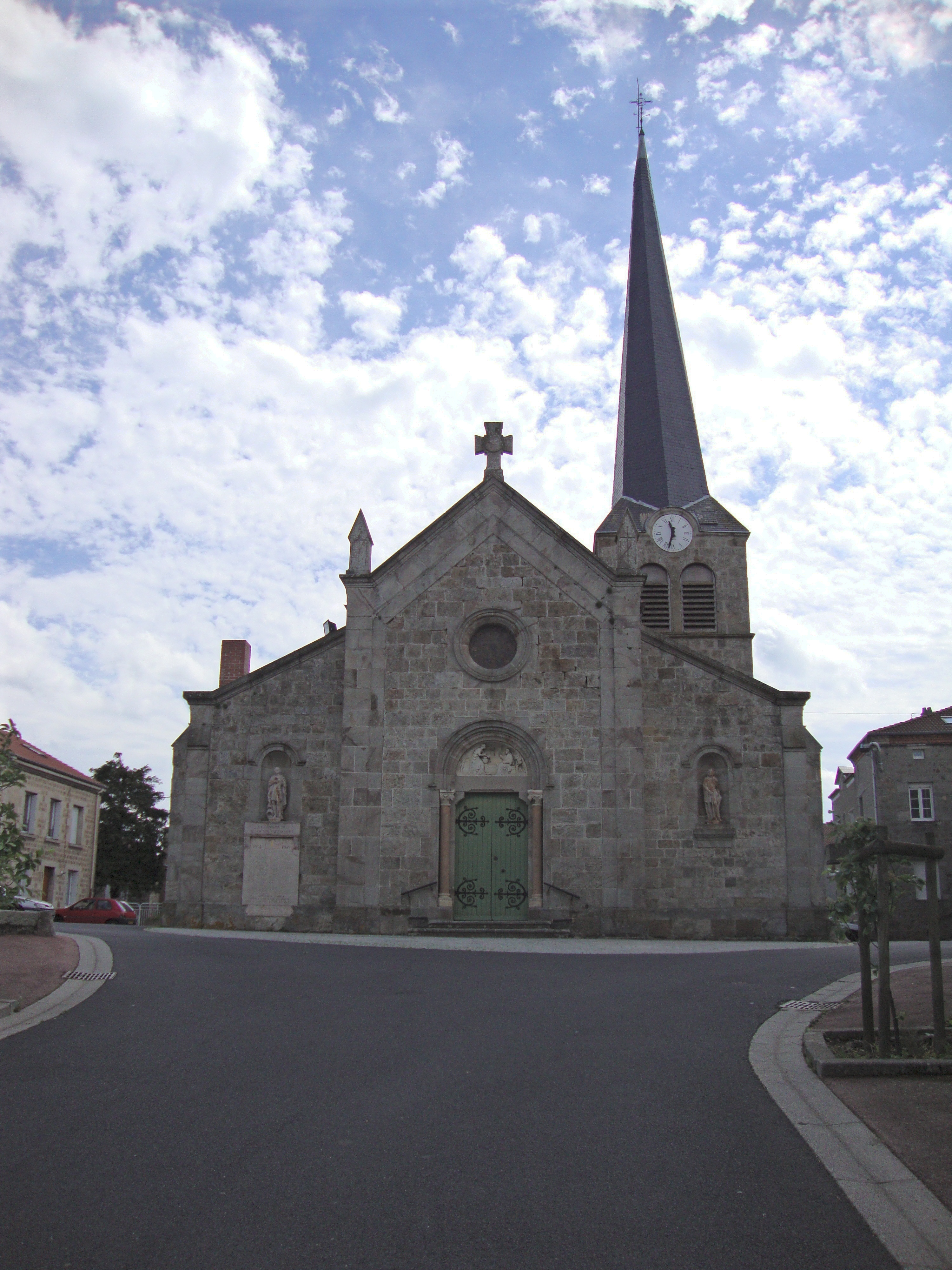 St.Victor-Malescourt (Haute-Loire, Fr) église, façade et tour